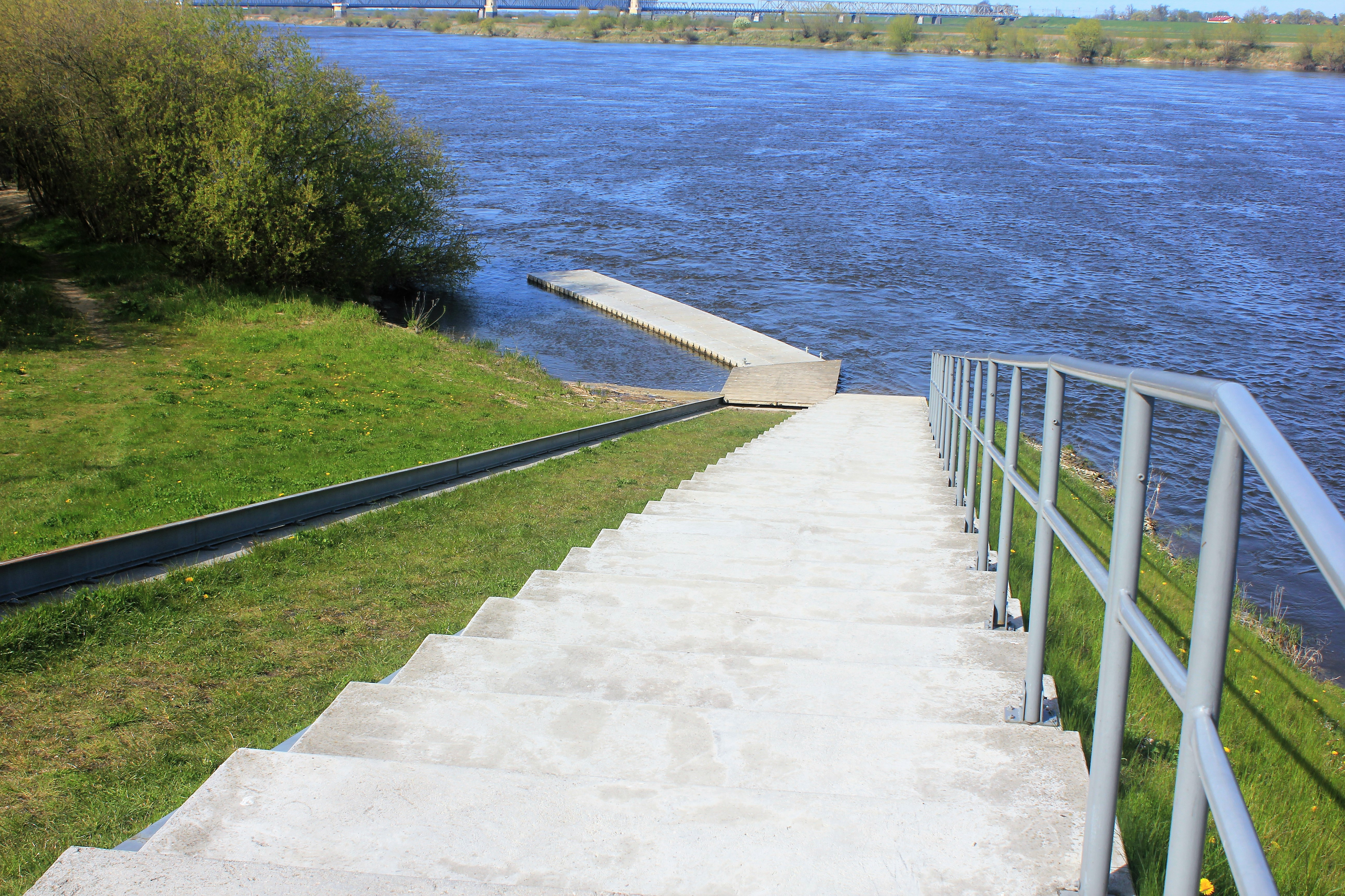 Przystań Unii Tczew - pomost i zejście nad Wisłę